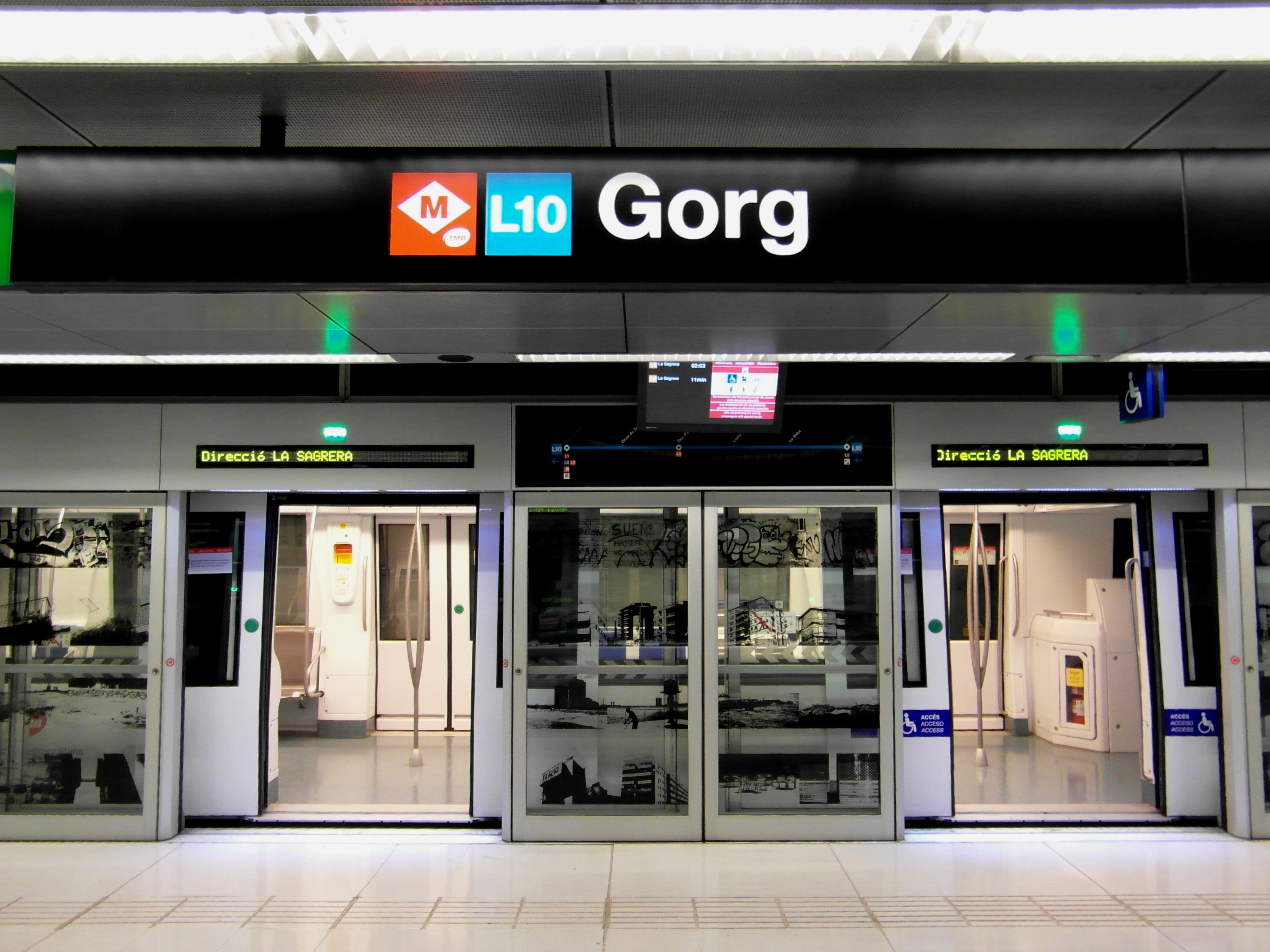 Barcelona - Estació de Gorg